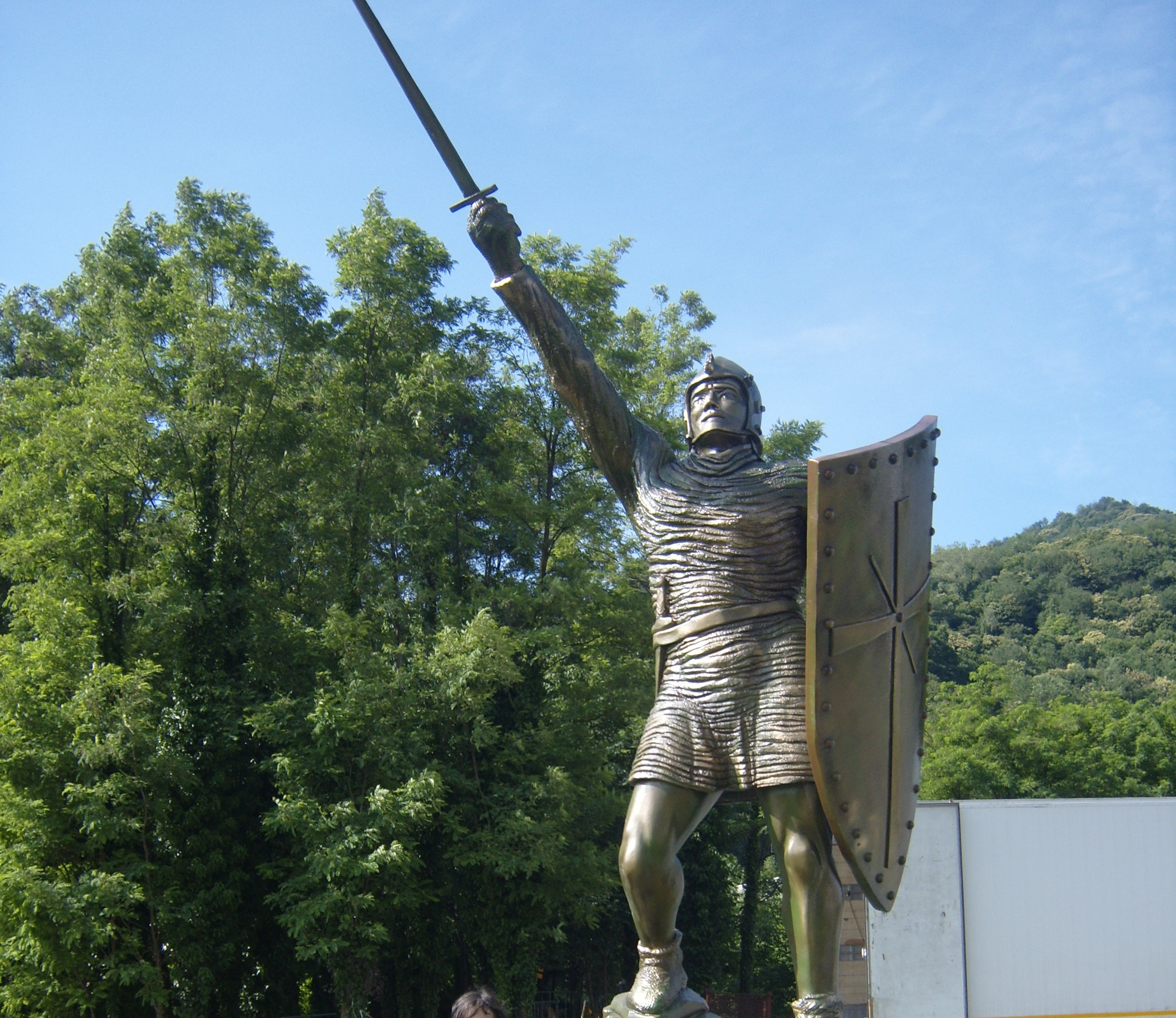 Statua di Alberto da Giussano al raduno di Pontida 2010.